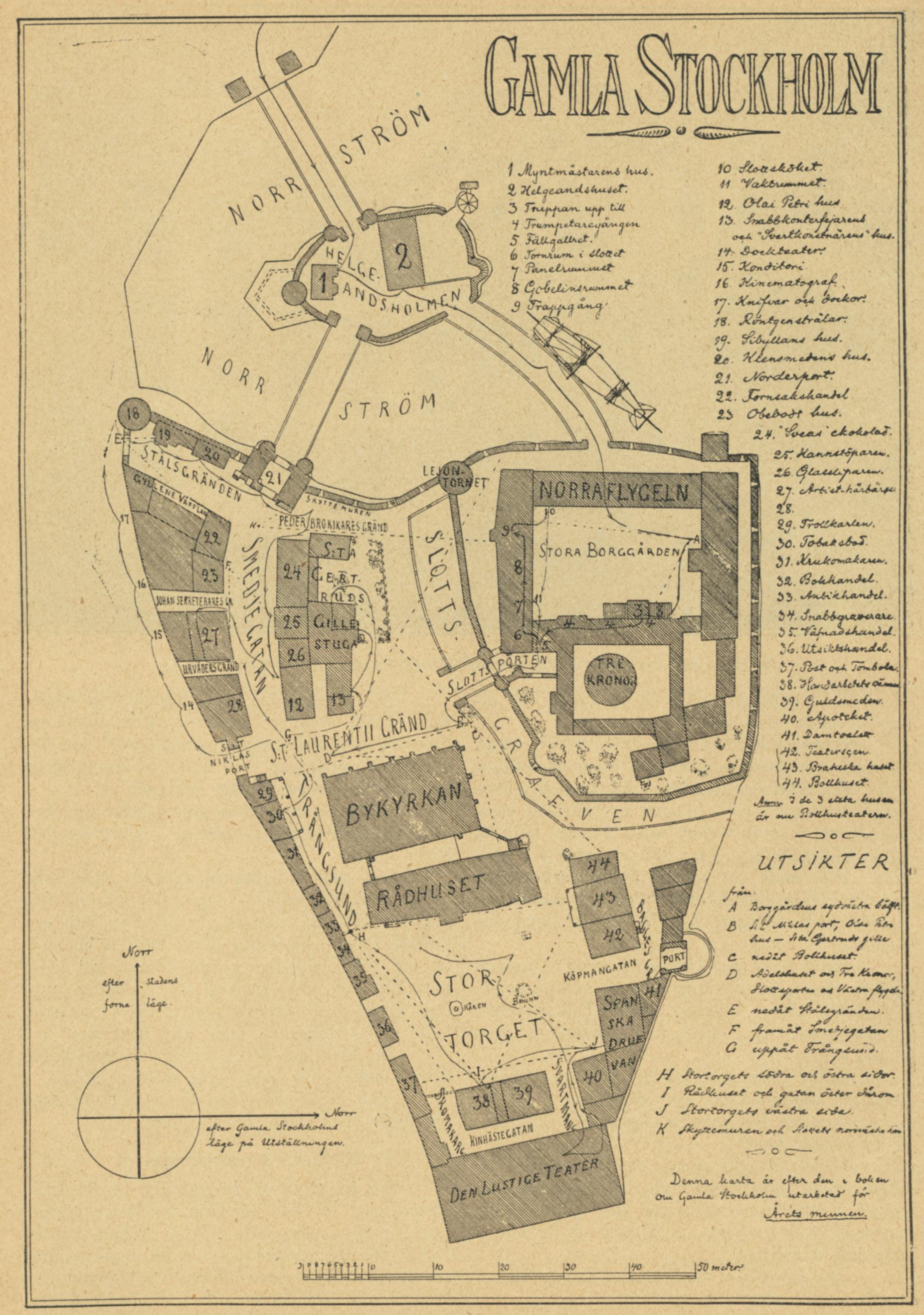 Karta över "Gamla Stockholm" på Stockholmsutställningen 1897